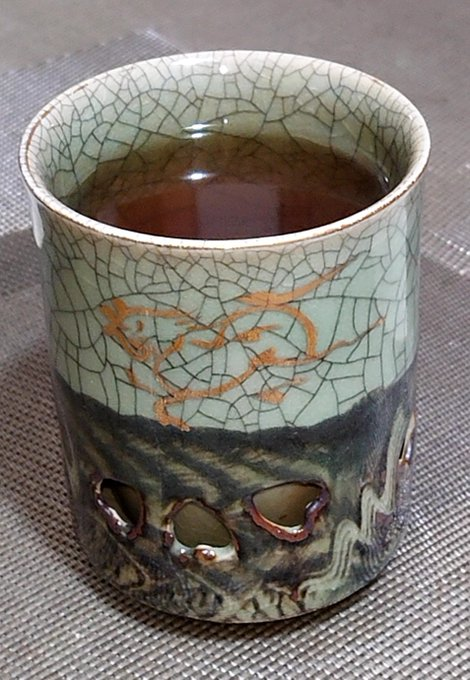 福島県相馬地方特産の陶磁器